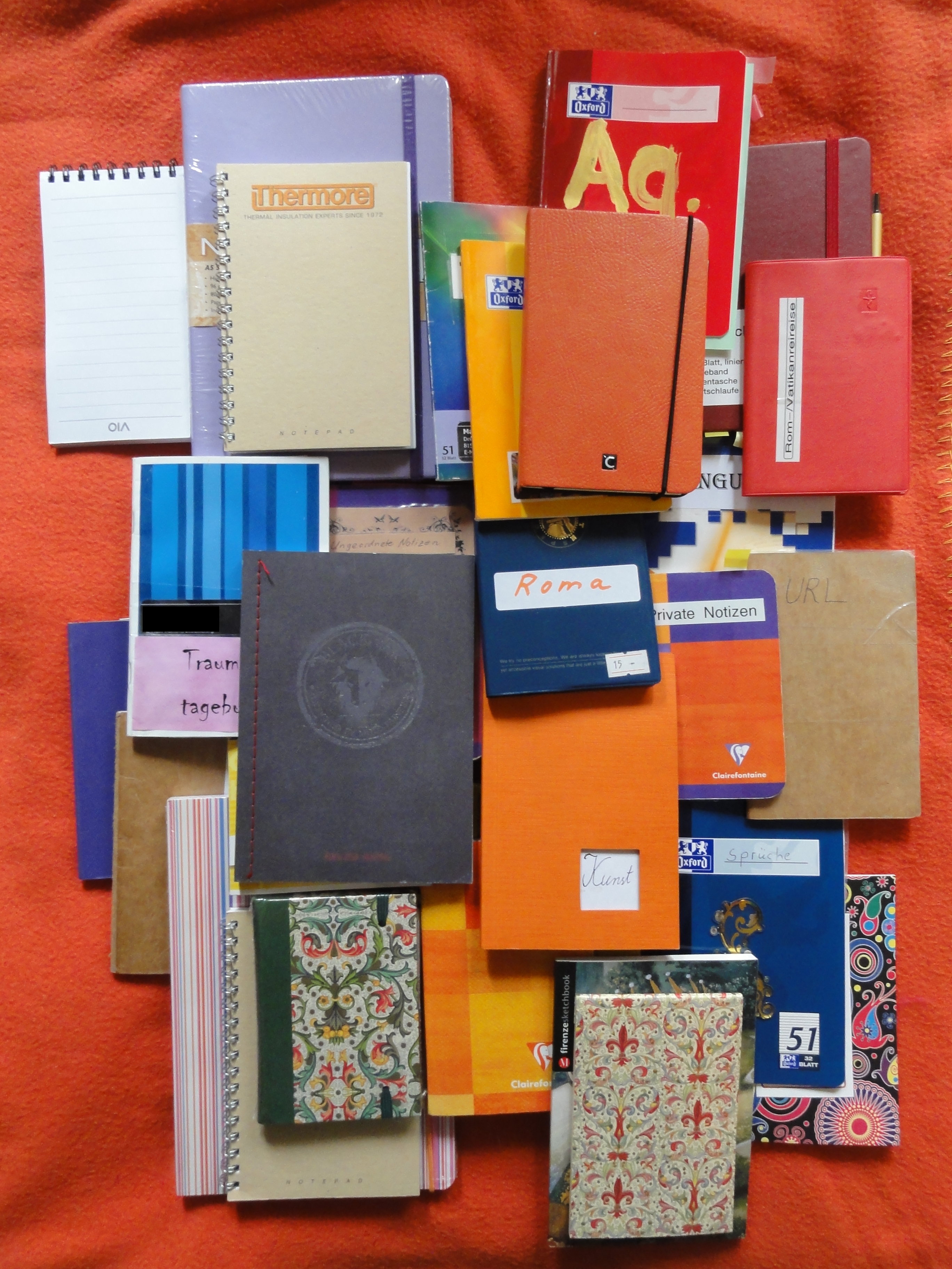 Verschiedene Notizbücher und -blöcke